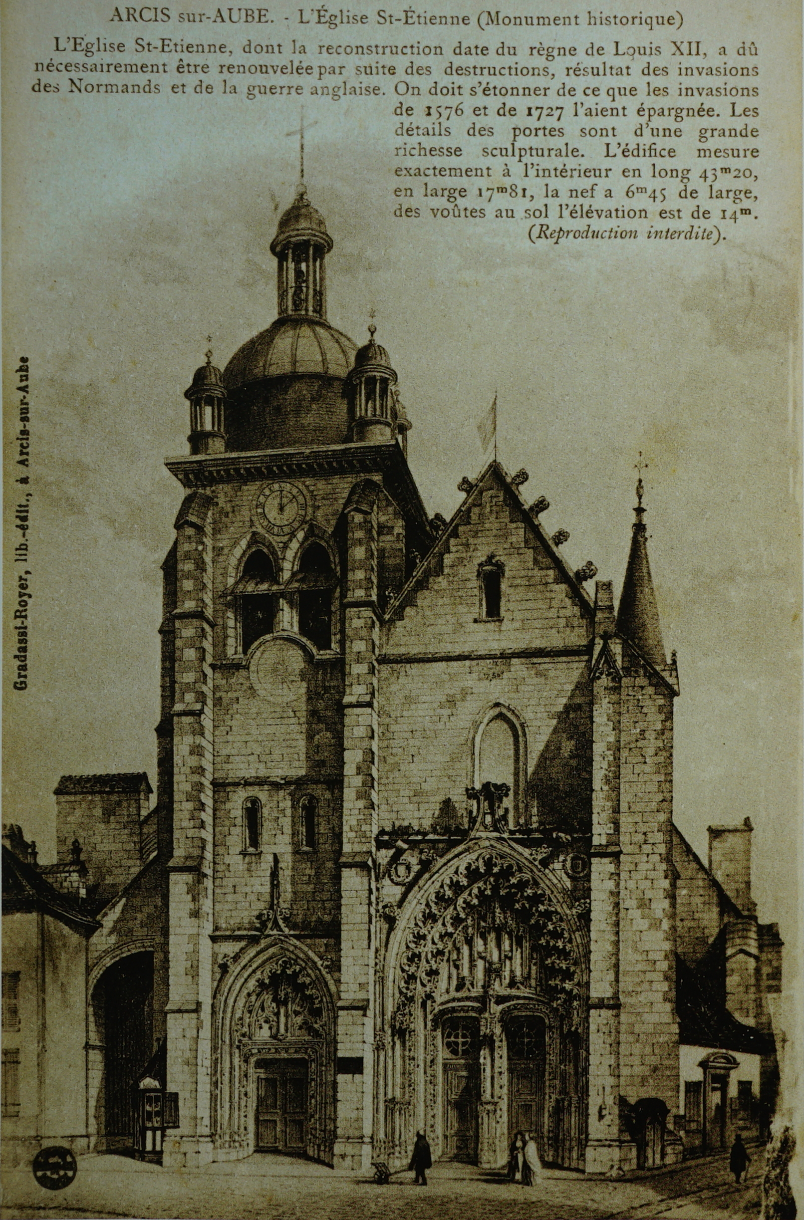 l'glise à Arcis.